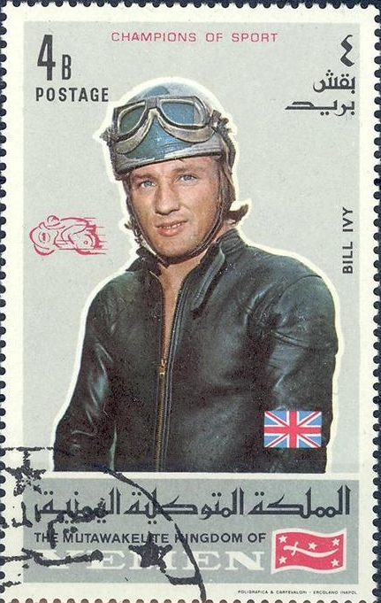 Bill Ivy